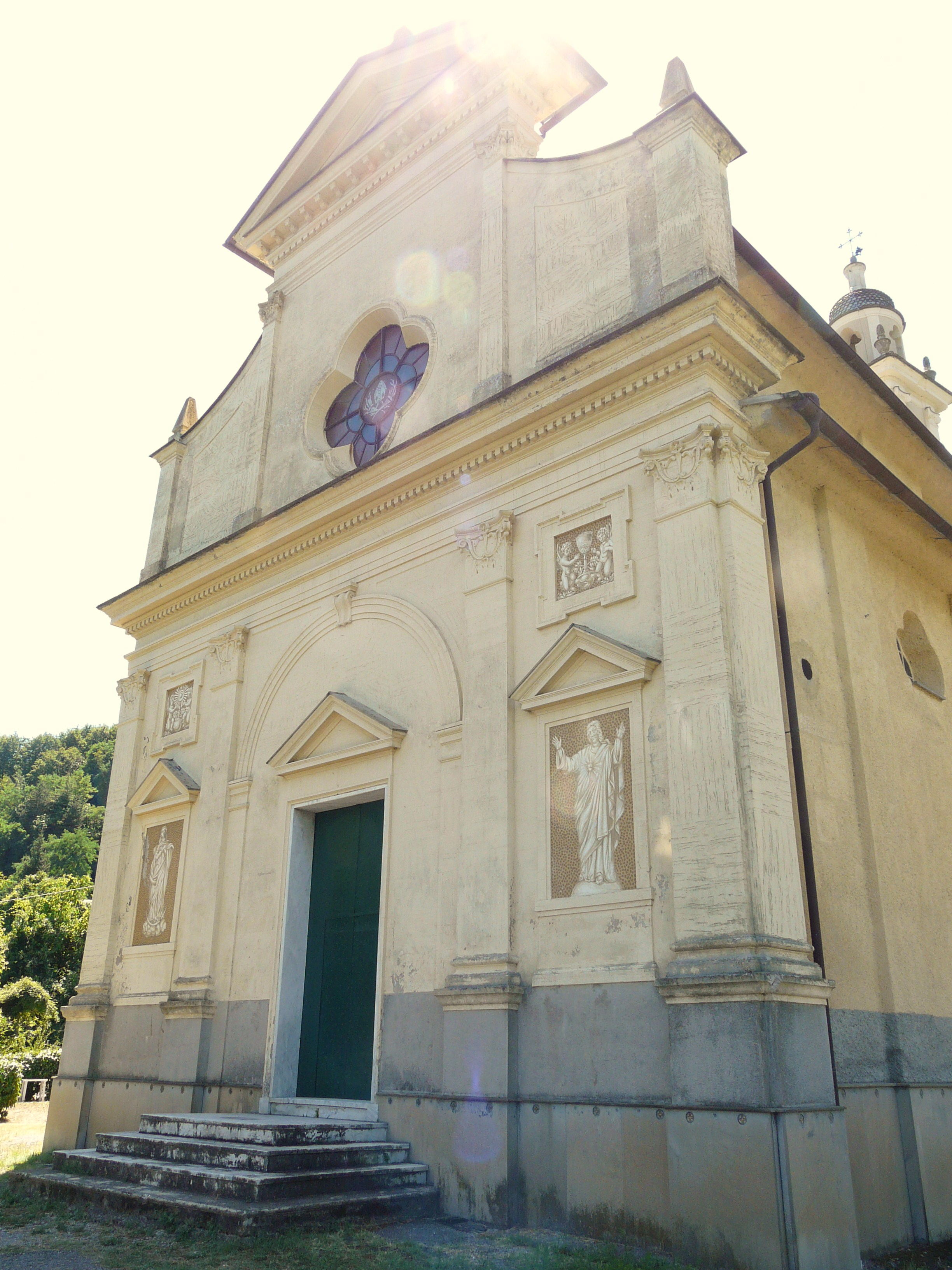 Chiesa di San Martino, Garbarini, Tribogna, Liguria, Italia